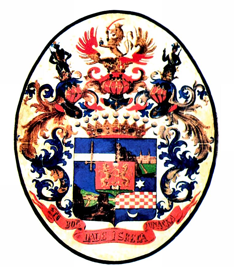 Grofovski grb bana Josipa Jelačića iz 1854. (sa Jelačićevim geslom: "Što Bog dade i sreća junačka"